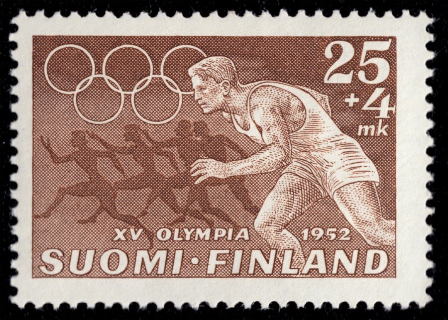 Tapio Wirkkala: Marka za Olimpijadu u Helsinkiju 1952., trkač